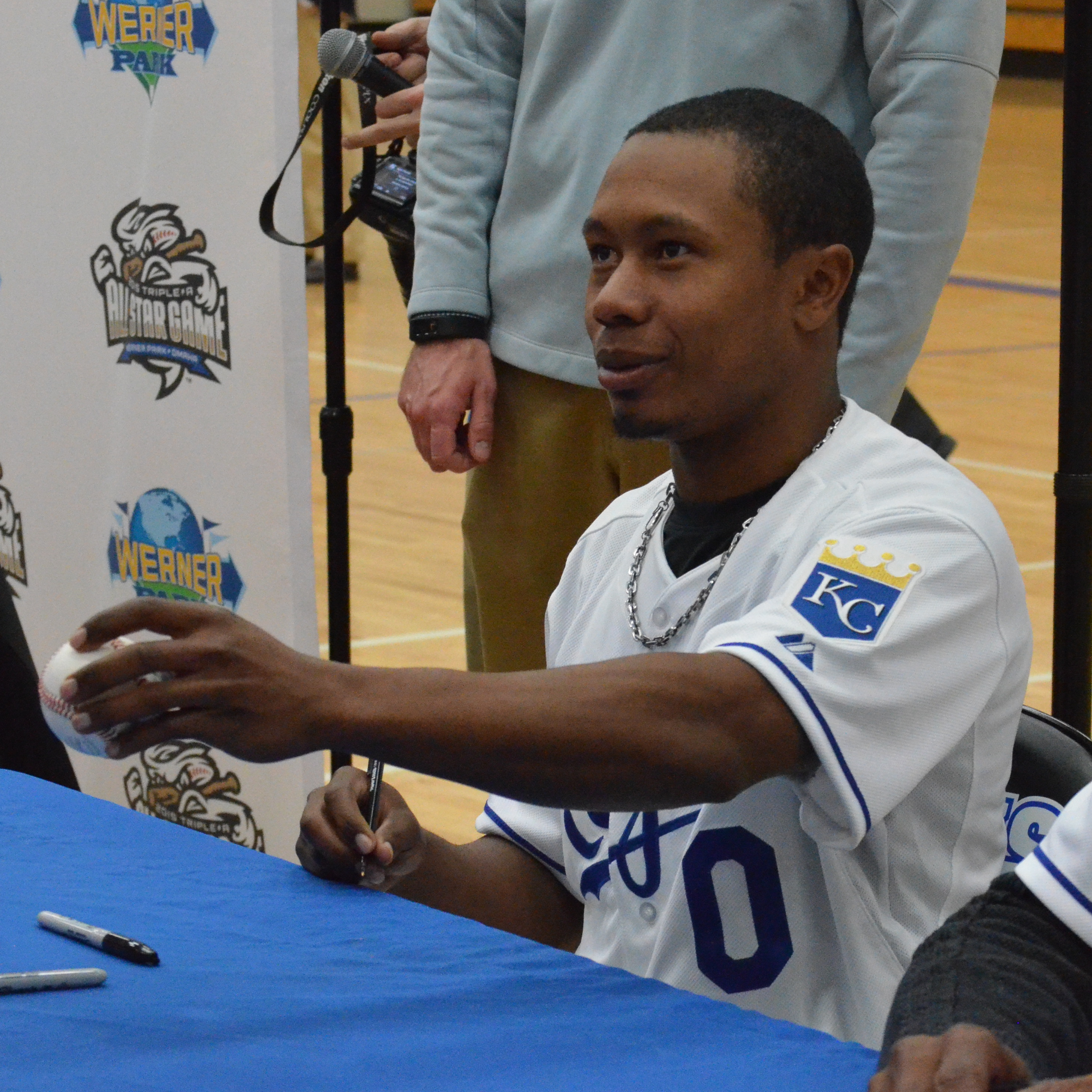 Terrance Gore